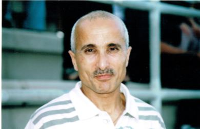 אריה גמליאל, יולי 2007